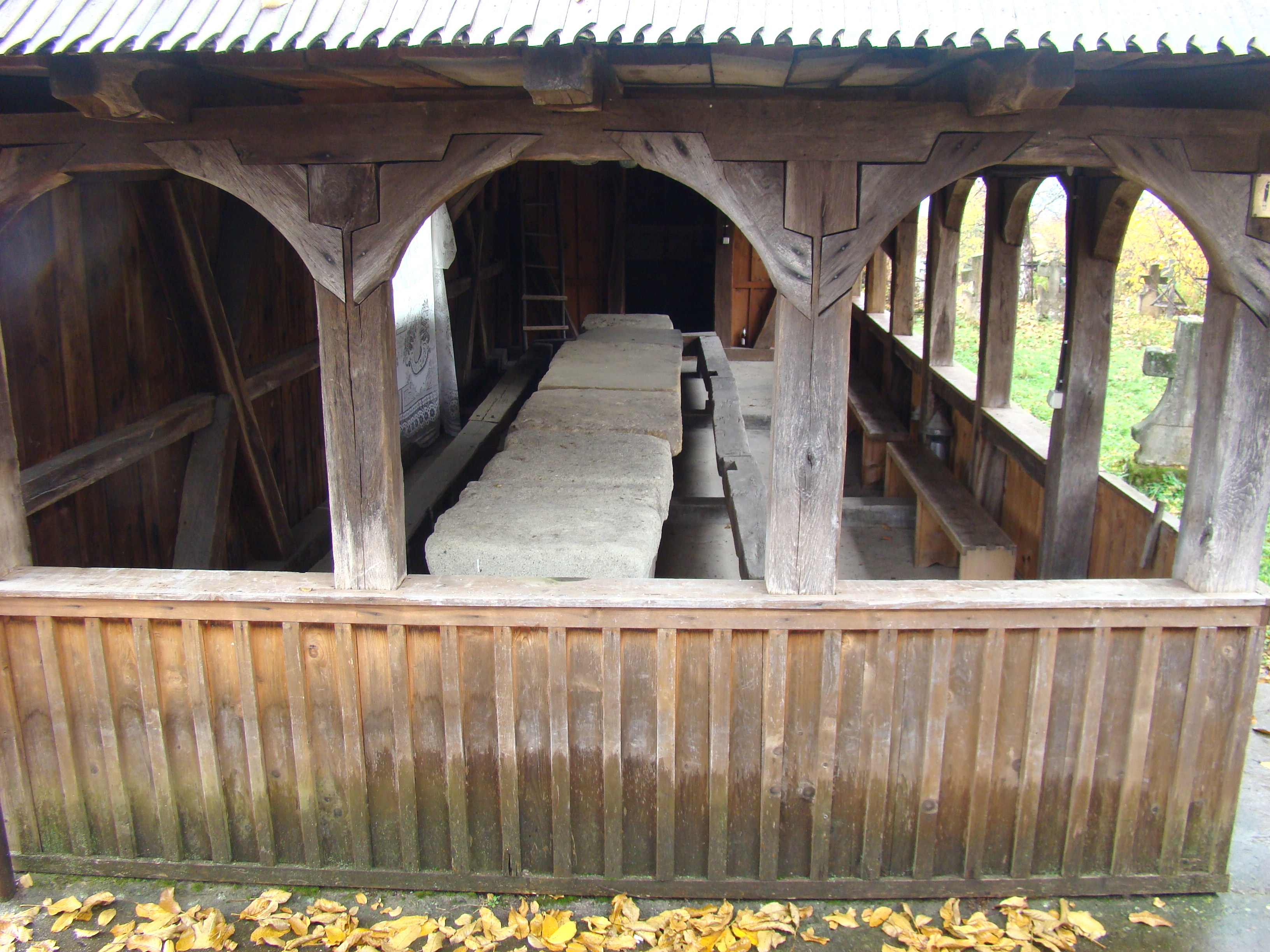 "Masa moșilor", sat Cetățele, județul Maramureș 02